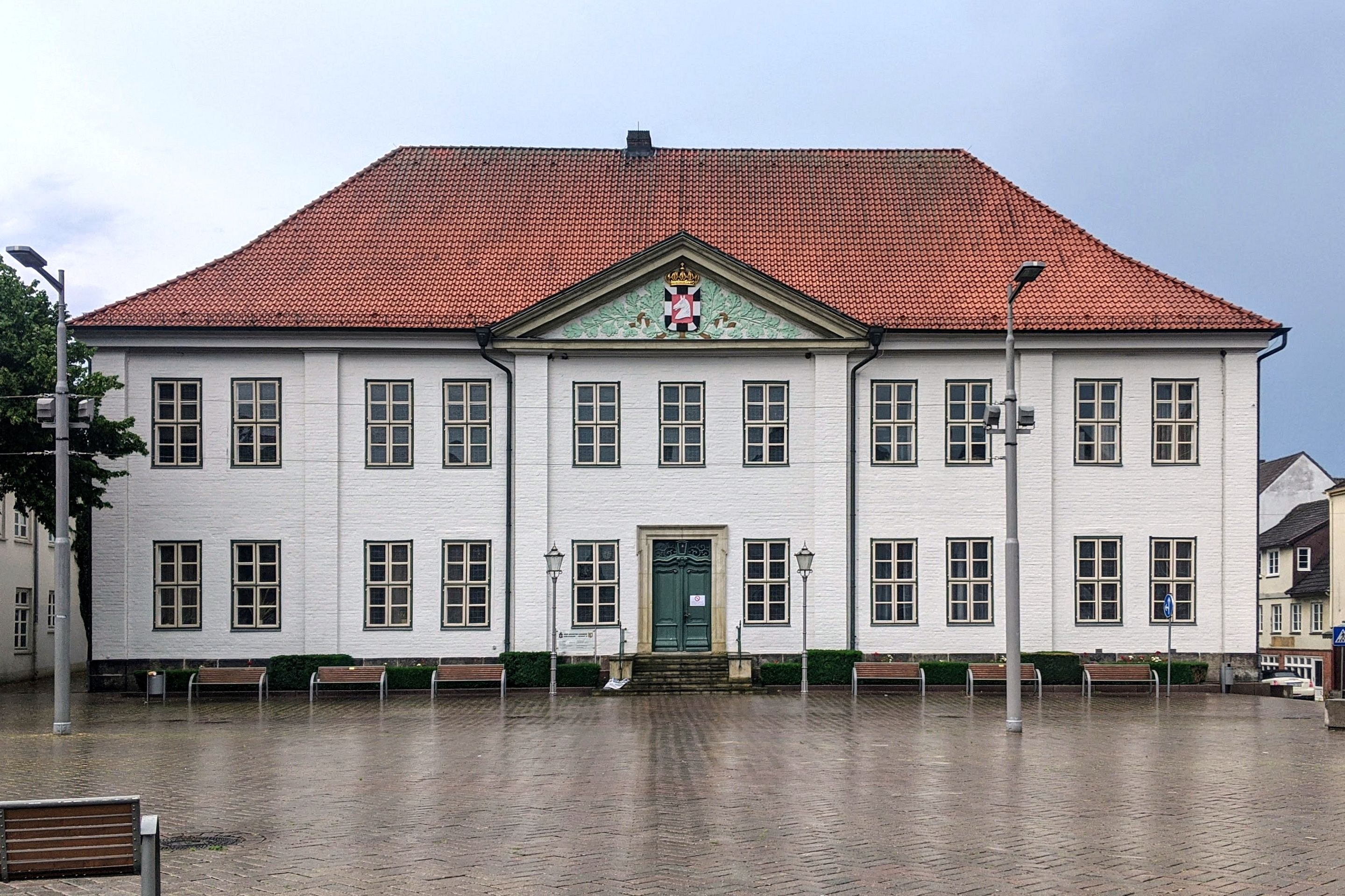 Altes Kreishaus in Ratzeburg, Am Markt 10